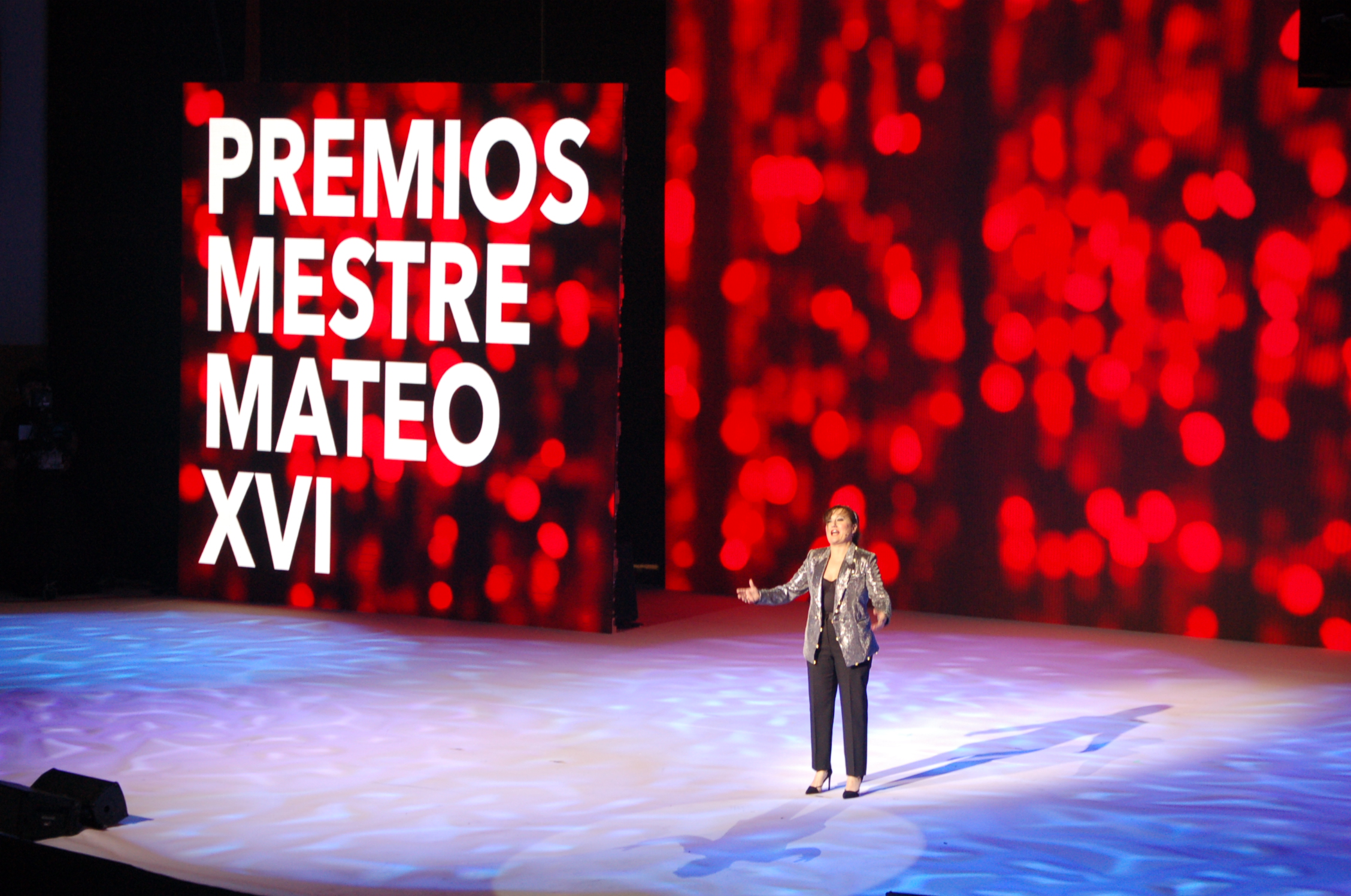 entrega dos Premios Mestre Mateo 2017